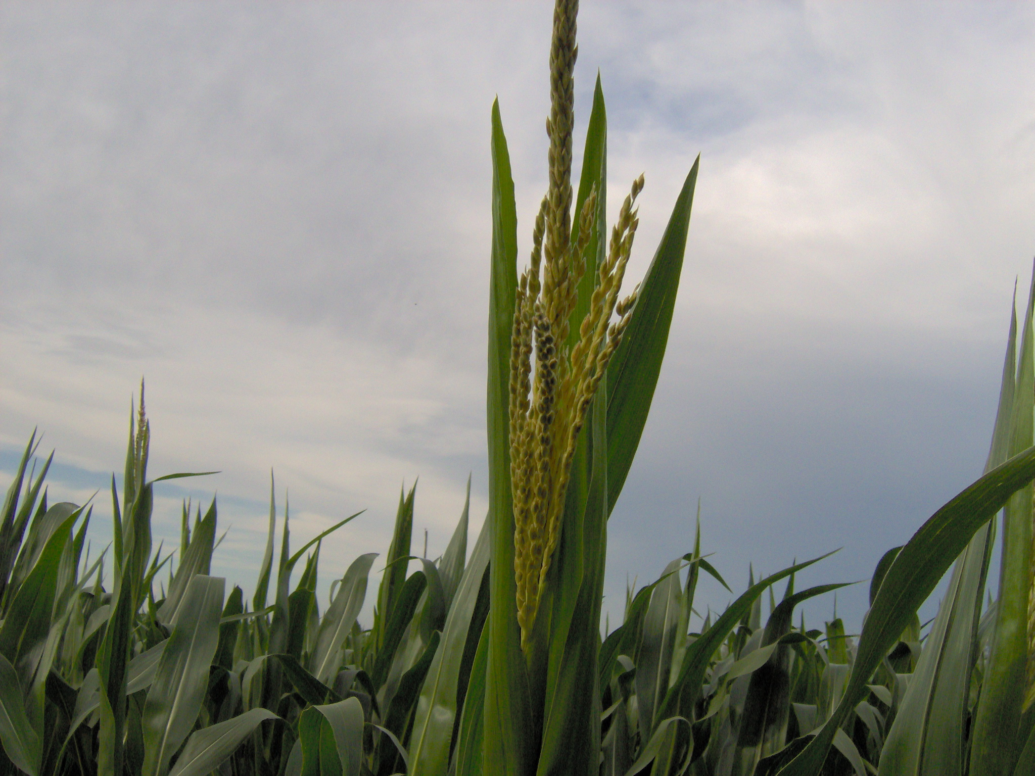 Flor masculina del maíz (Zea mays)